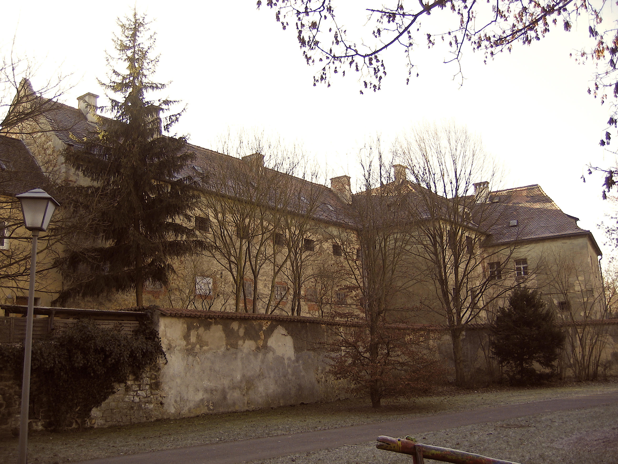 Foto vor dem Kauf und Renovierung der Fronfeste im Jahre 2007, aktuell in besserem Zustand und Betrieb als Hotel.